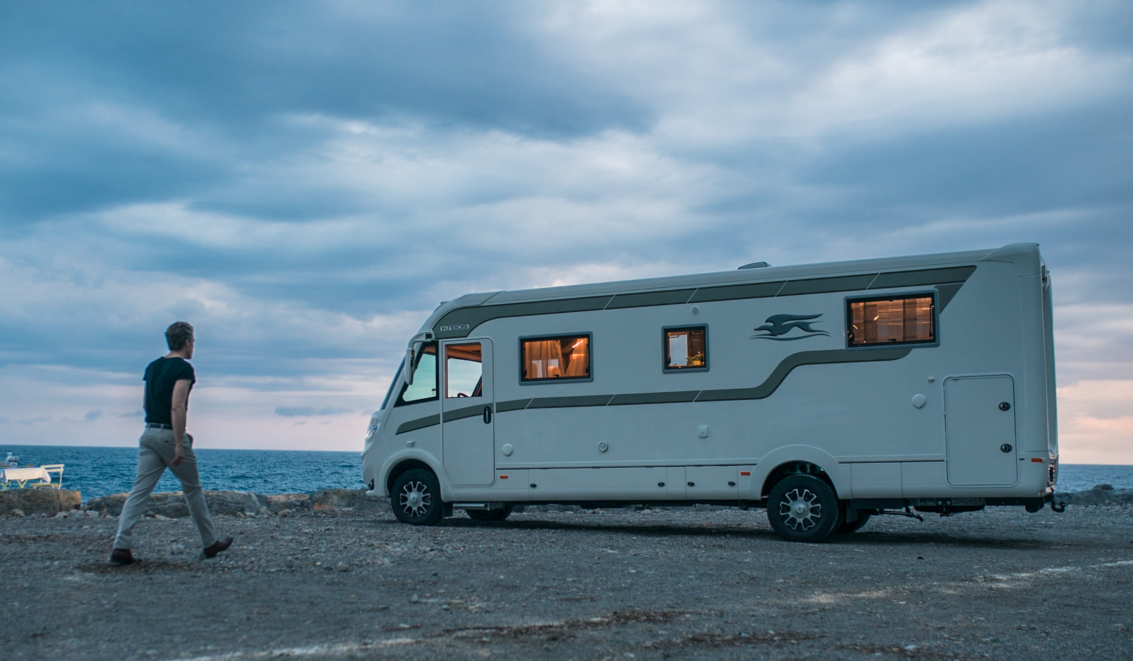 Kreos Motorhome - shooting 2019 per il catalogo 2019/2020.